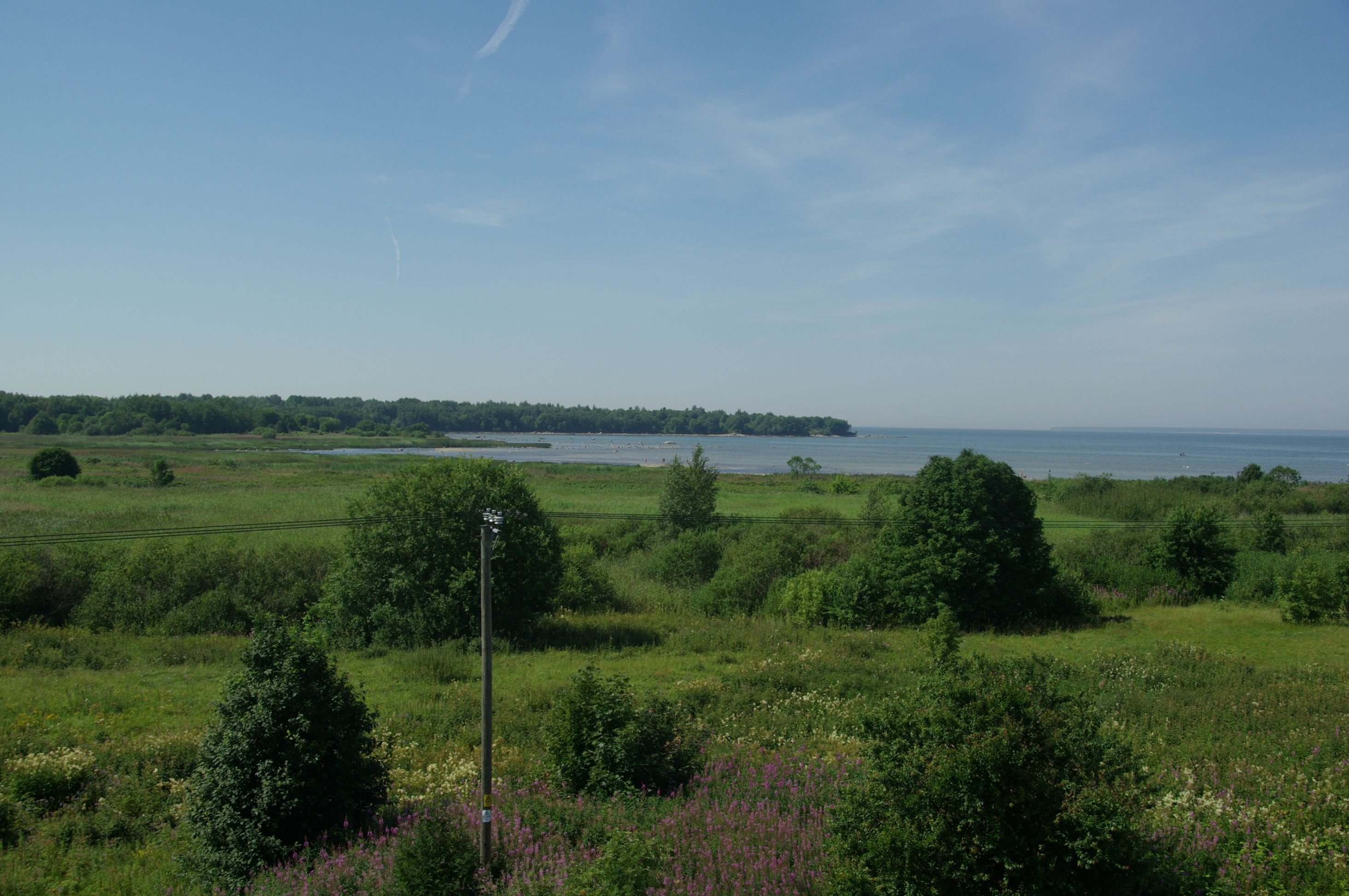 Paljassaare hoiuala